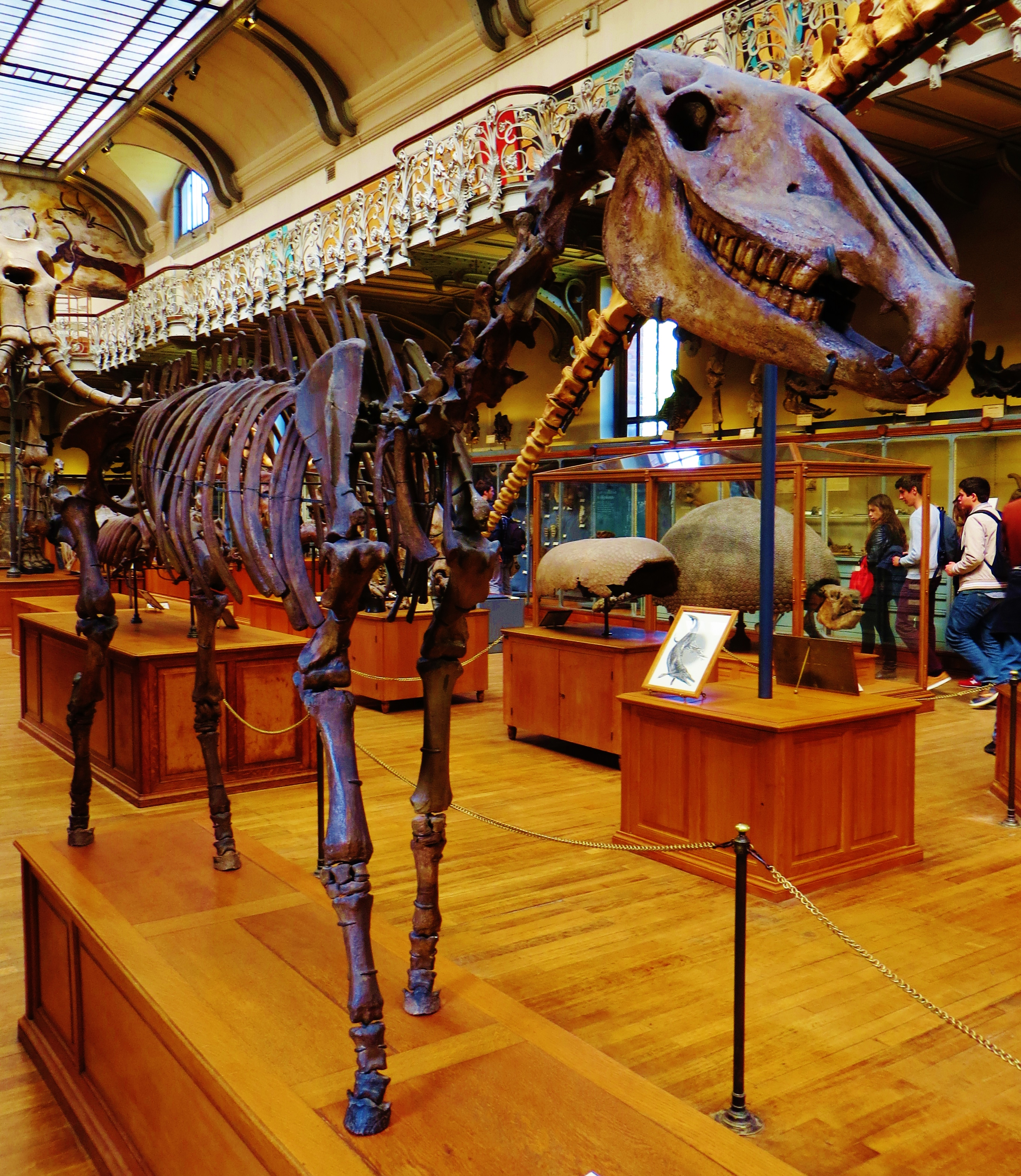 Fossil of Hippidion, an extinct mammal- Took the photo at Musee d'Histoire Naturelle, Paris